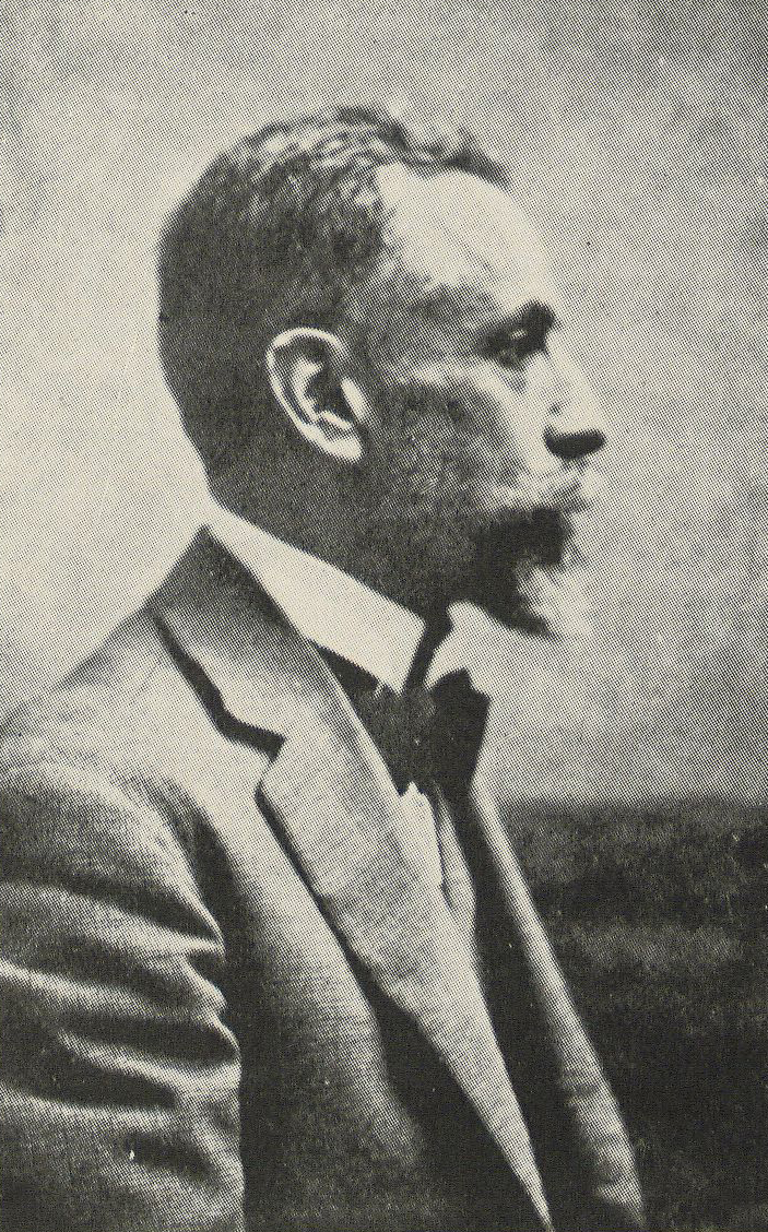 Ramón Alberto Valenzuela Llanos (n. San Fernando, 29 de agosto de 1869 - Santiago de Chile, 23 de julio de 1925). Pintor chileno perteneciente a los "Grandes Maestros de la pintura Chilena" junto con Pedro Lira, Alfredo Valenzuela Puelma y Juan Francisco González que vivió entre los siglos XIX y XX. Paisajista, se estima su legado en más de mil cuadros. Sus obras cumbres son, las montañas nevadas, los valles y las vistas de París. Sus pinturas, de grandes dimensiones y colores pasivos y relajantes, son el reflejo de las nuevas corrientes impresionistas que comenzaron a impregnarse dentro del ámbito pictórico chileno. Recibió un amplio reconocimiento internacional, llegando a convertirse en uno de los artistas chilenos más premiado en el extranjero. Valenzuela Llanos fue discípulo de Cosme San Martín y Juan Mochi, ambos directores del Museo Nacional de Bellas Artes, siendo este último el que más influyo en el pintor. Entre sus maestros también destacan el pintor romántico Onofre Jarpa. El gobierno francés en honor a sus méritos le entrega la Cruz de Caballero de la Legión de Honor (1923), y fue nombrado miembro de la Sociedad de Artistas Franceses en 1924 un año antes de su muerte.